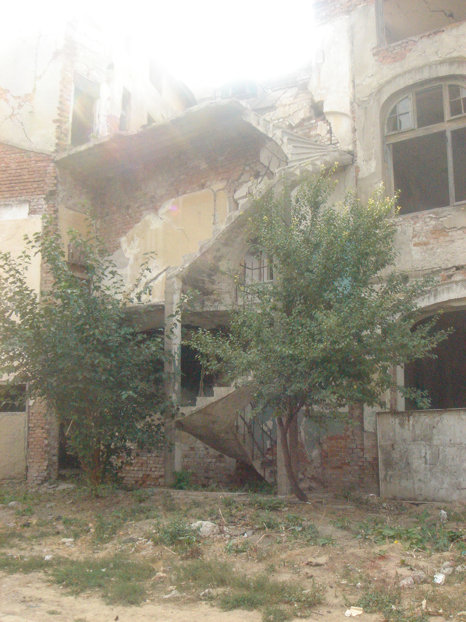 Aflat pe Domneasca nr. 24, Palatul Gheorghiu este intro stare jalnica. Primaria nu se poate atinge de el, deoarece sunt la rampa falsii mostenitori, care doresc sa puna mana pe imobil.